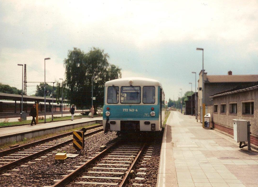 Triebwagen 772 143-4 steht im Sommer 2000 in Brandenburg (Havel) Hbf. bereit zur Abfahrt als RB 52 in Richtung Belzig.